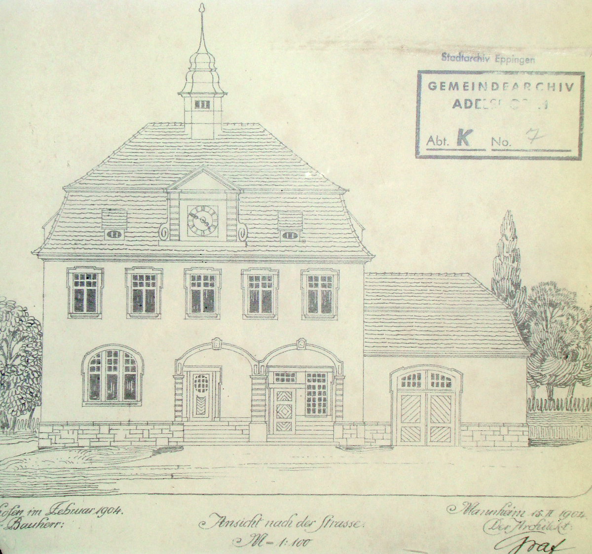 Bauplan des Rathauses in Adelshofen, 1904, reproduziert auf einer infotafel am rathaus in adelshofen